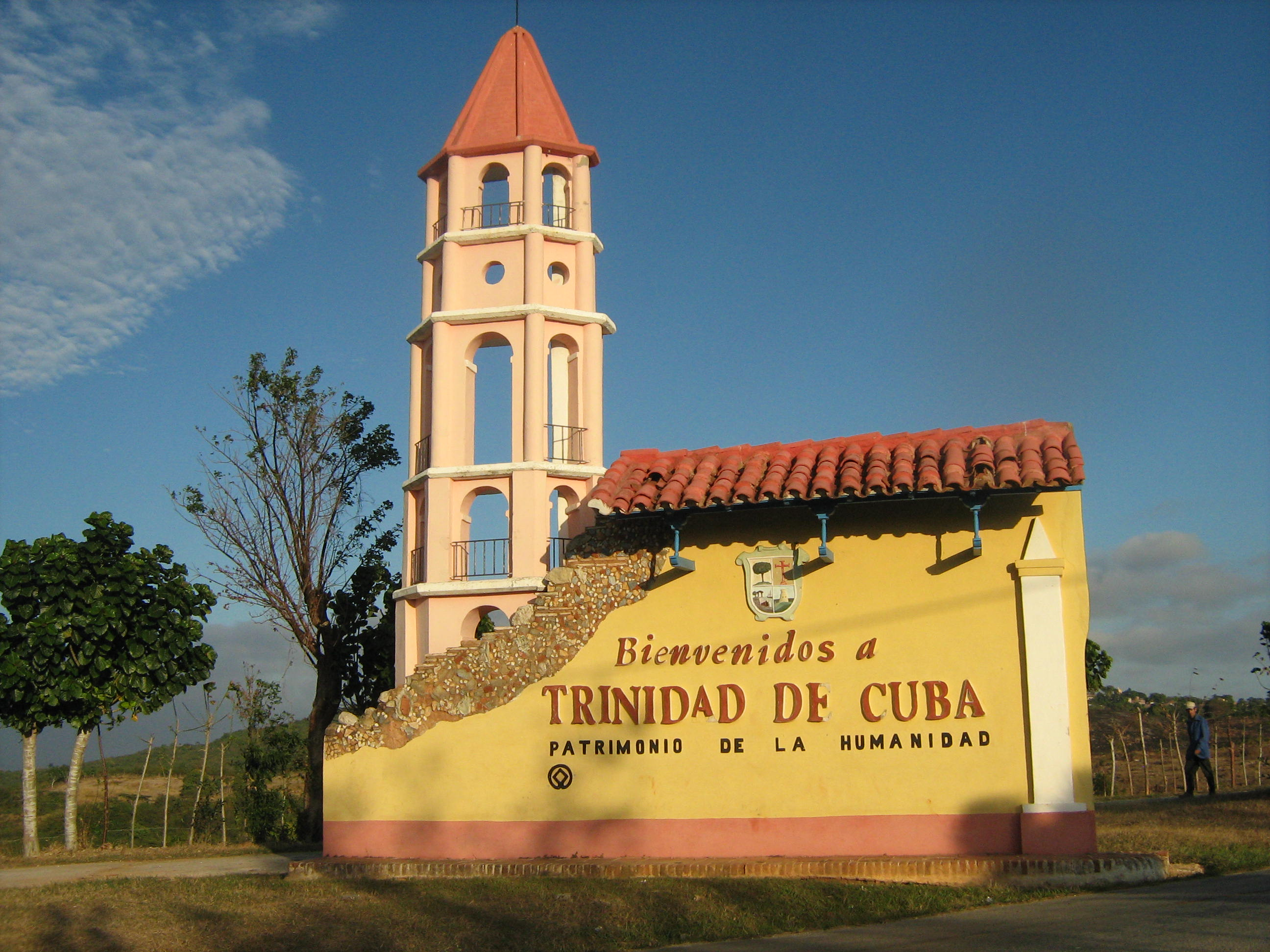 Entrée de Trinidad sur la route N°12, Cuba.